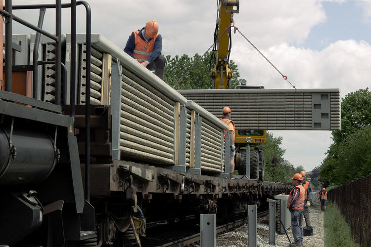 Niedrigschallschutzwände der Firma Betonwerk Rieder GmbH